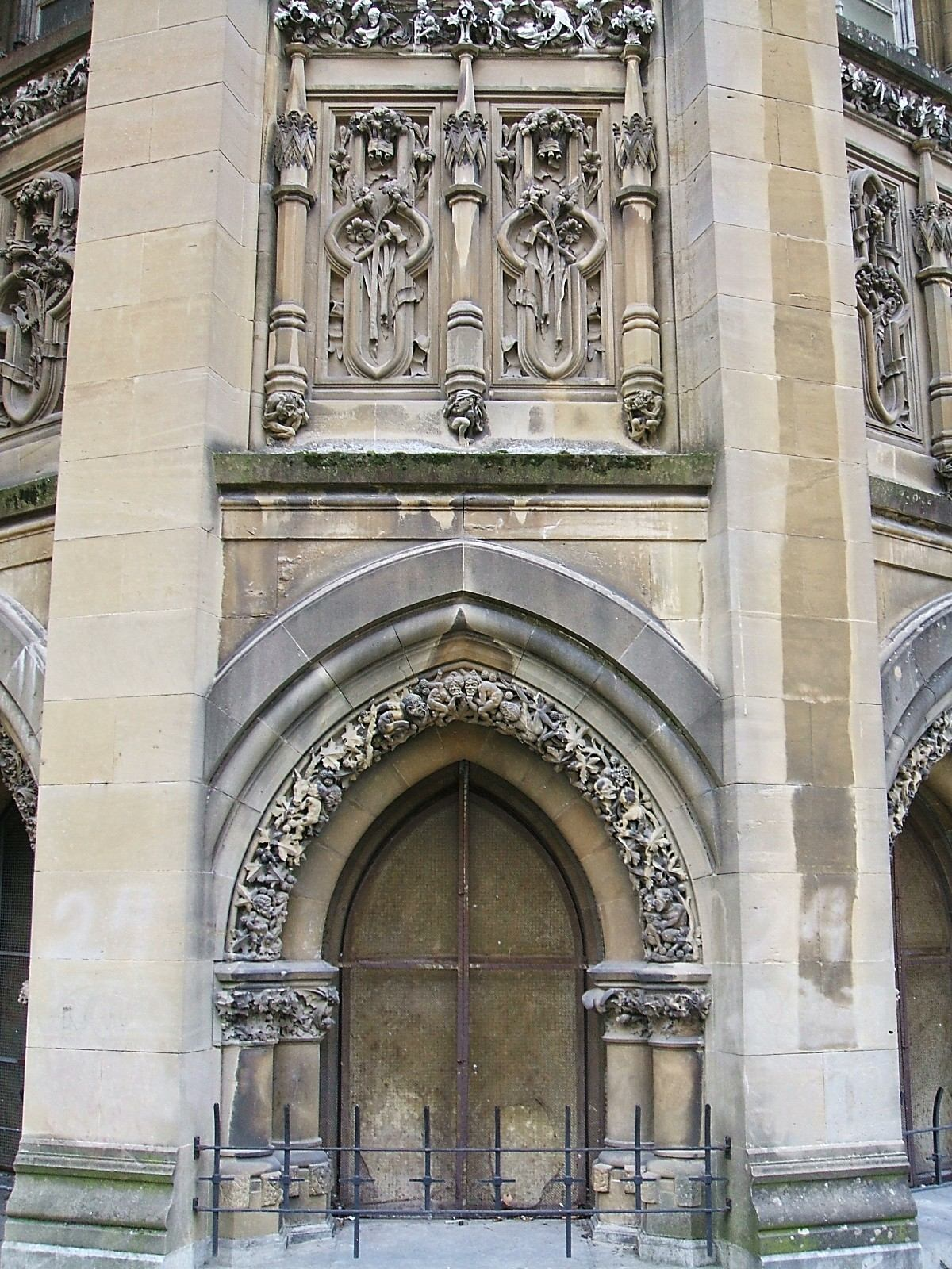 Paño absidial de la Capilla del Sagrado Corazón de María, de Catedral Nueva de Vitoria-Gasteiz